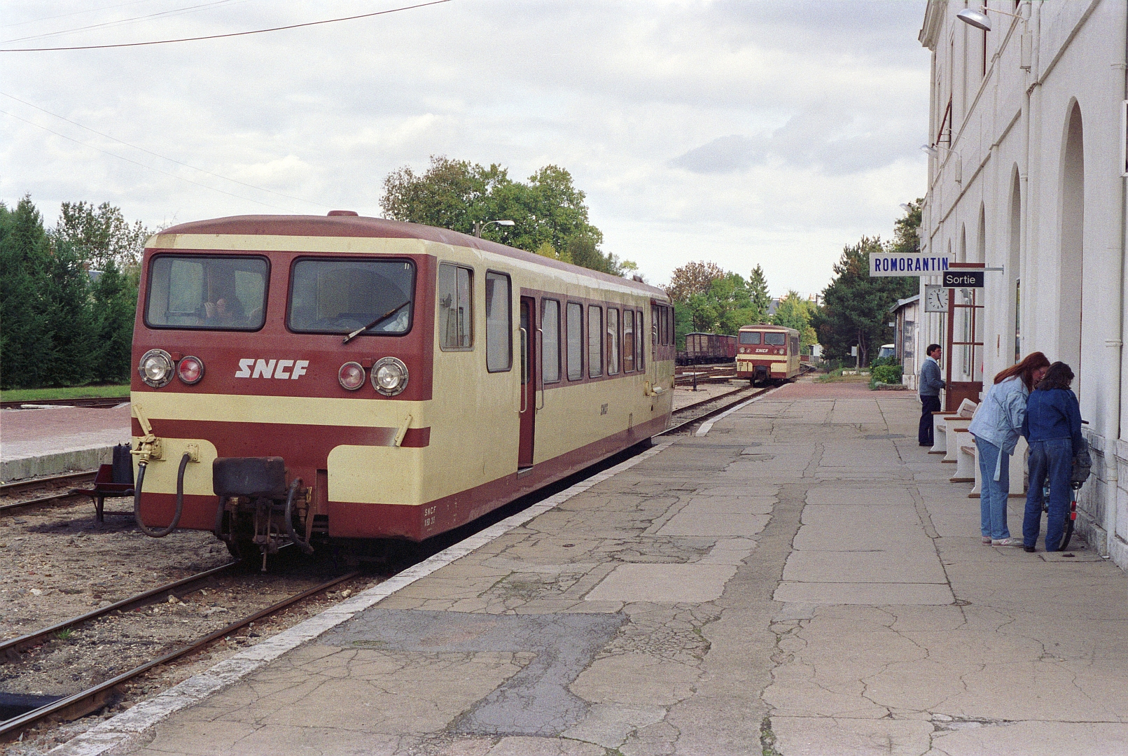 L'autorail Verney X213 en gare de Romorantin le 14 octobre 1989.